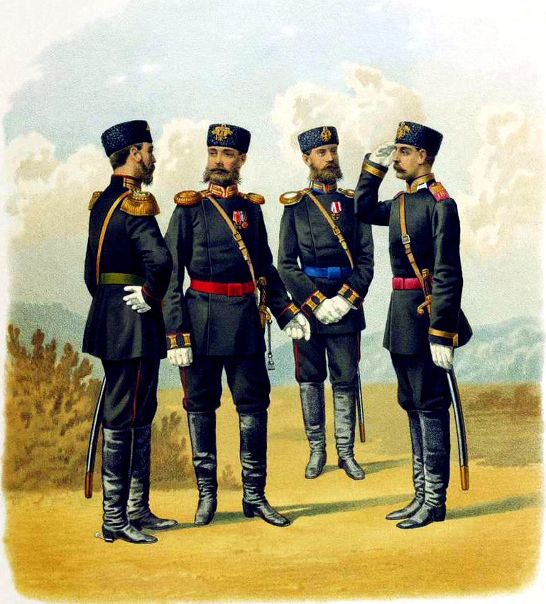 Армейские Пехотные войска. Штаб-Офицер 68-го пехотного Лейб-Бородинского Его Величества полка и Обер-Офицеры: 1-го Лейб-Гренадерского Екатеринославского Его Величества полка и 2-го Резервного пехотного батальона ( кадрового ) в обыкновенной форме. Фельдфебель 16-го Стрелкового Его Величества батальона в парадной и обыкновенной форме, вид строя. прик. по воен. вед. 1882 г. № 6.